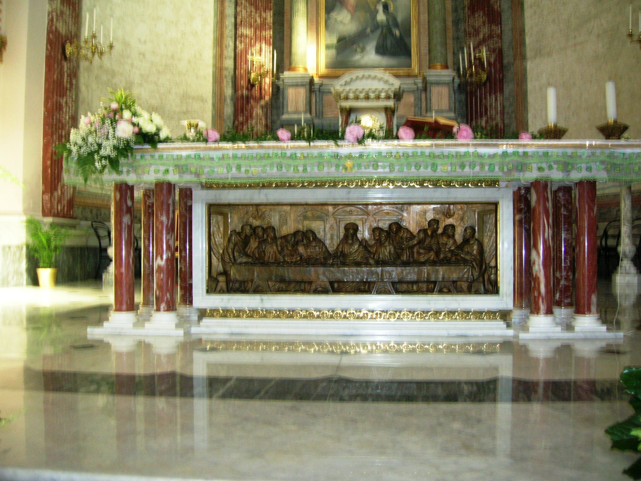 Particolare dell'altare maggiore del Santuario del Sacro Cuore di Castellammare di Stabia